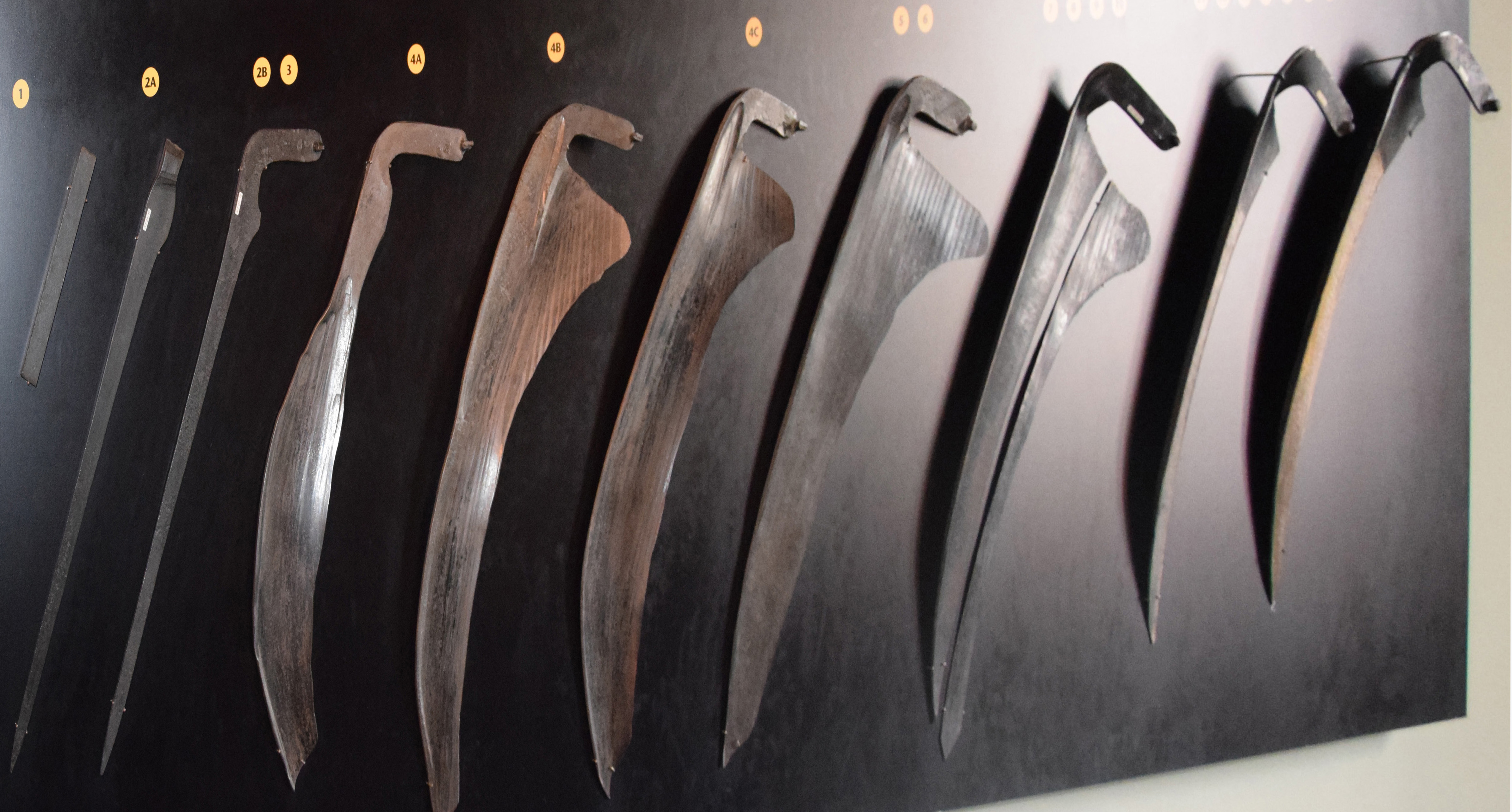 Maison de la Manufacture de Klingenthal (Bas-Rhin)